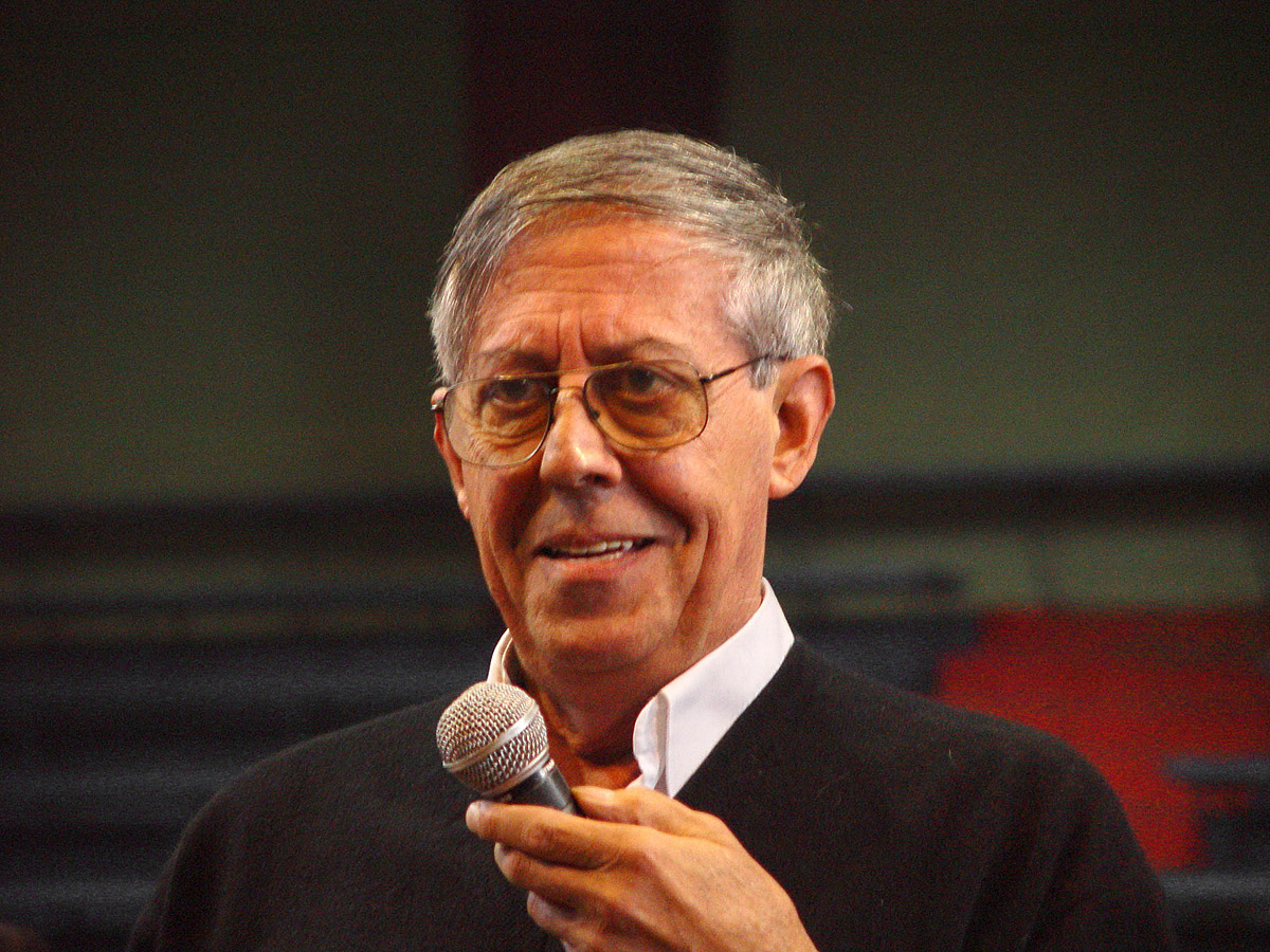 Ceremonia de imposición Septiembre 2002, estadio Nataniel, en santiago. La primera ceremonia pública del Mensaje oficiada por Silo en Chile.